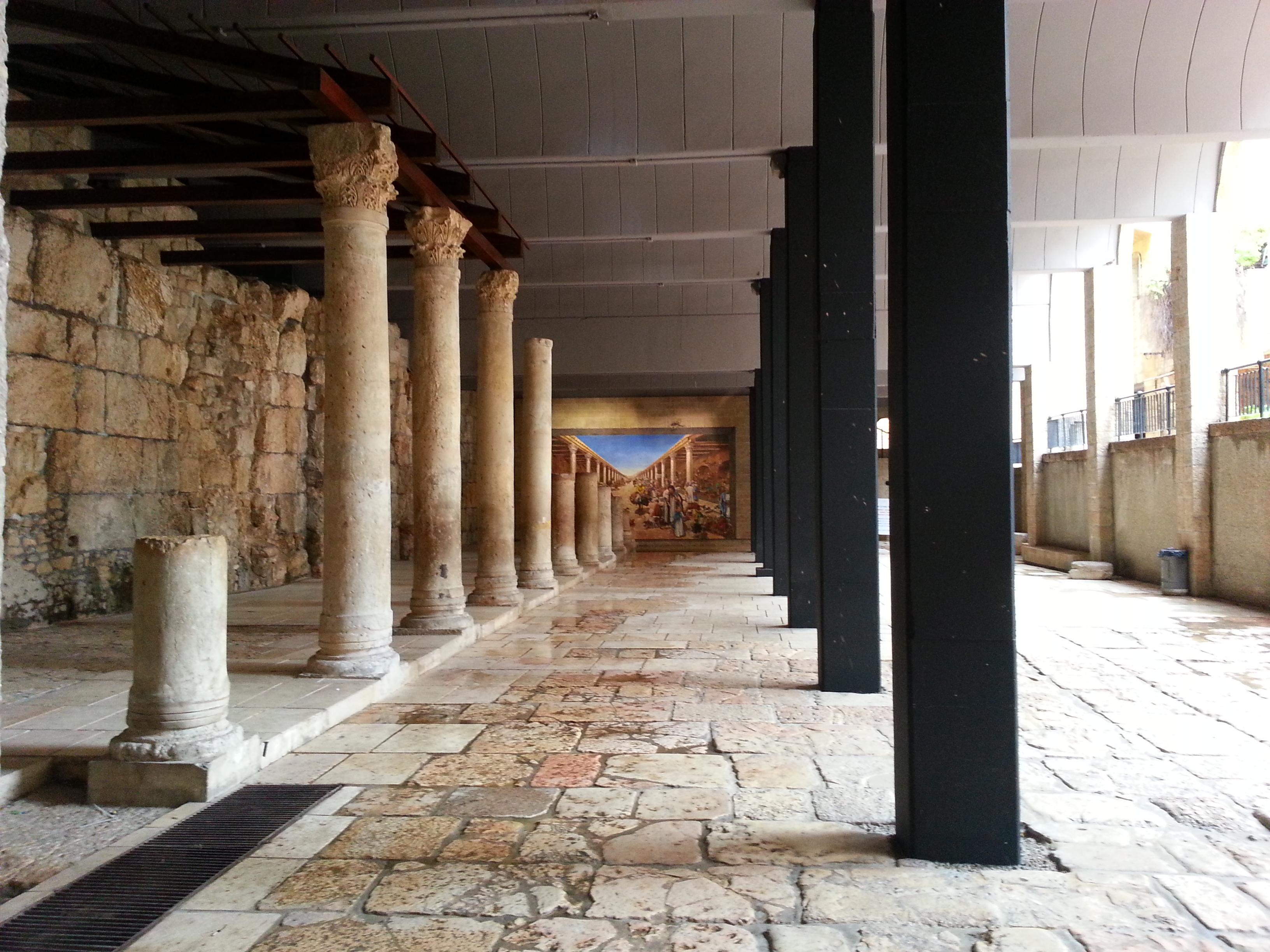 מראה בעיר העתיקה